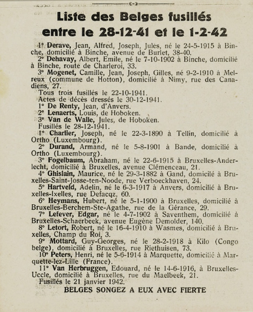 Extrait de la Libre-Belgique Clandestine du 15 février 1942 (domaine public)